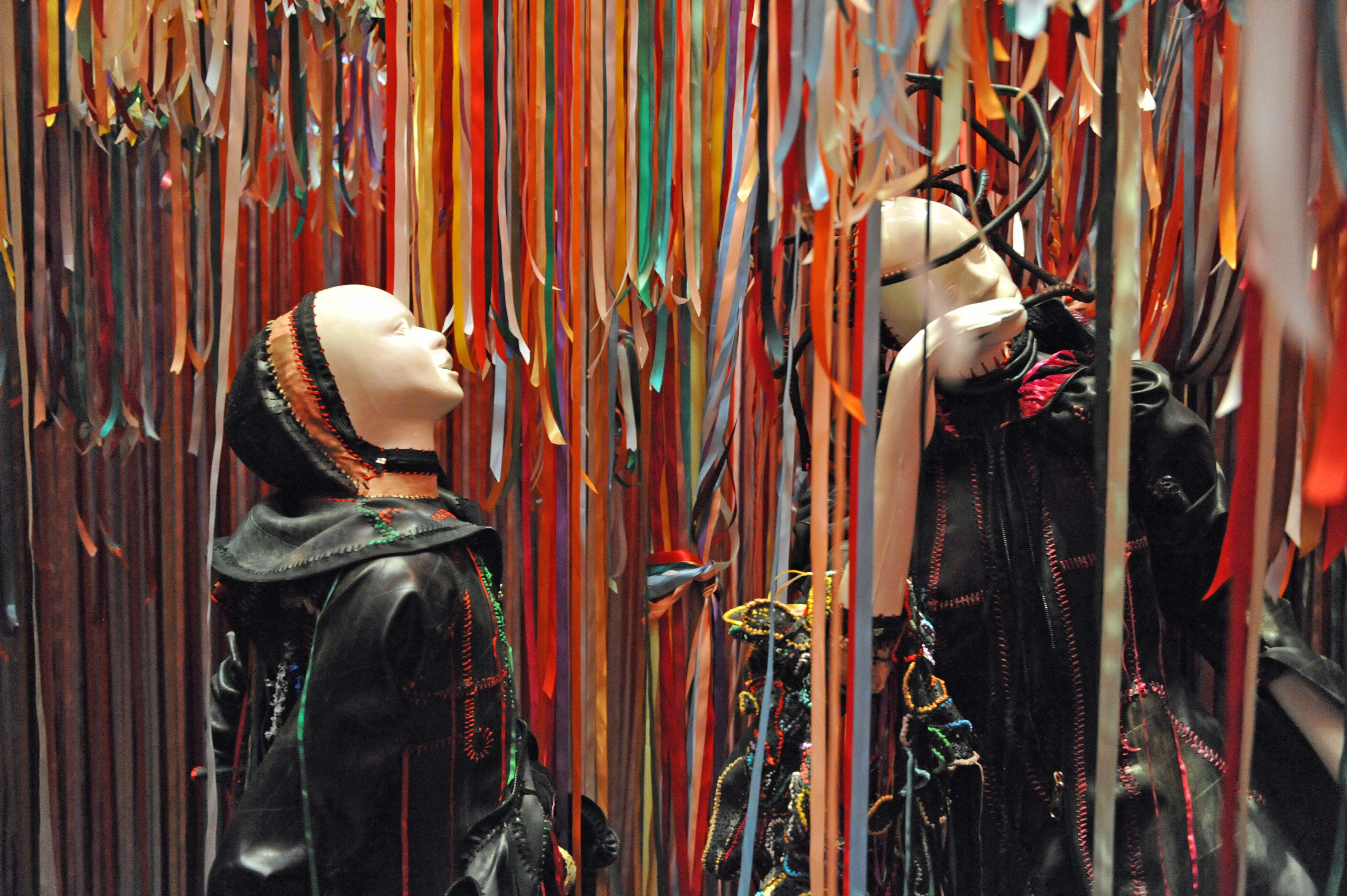 Nicholas Hlobo, Ndize, 2010